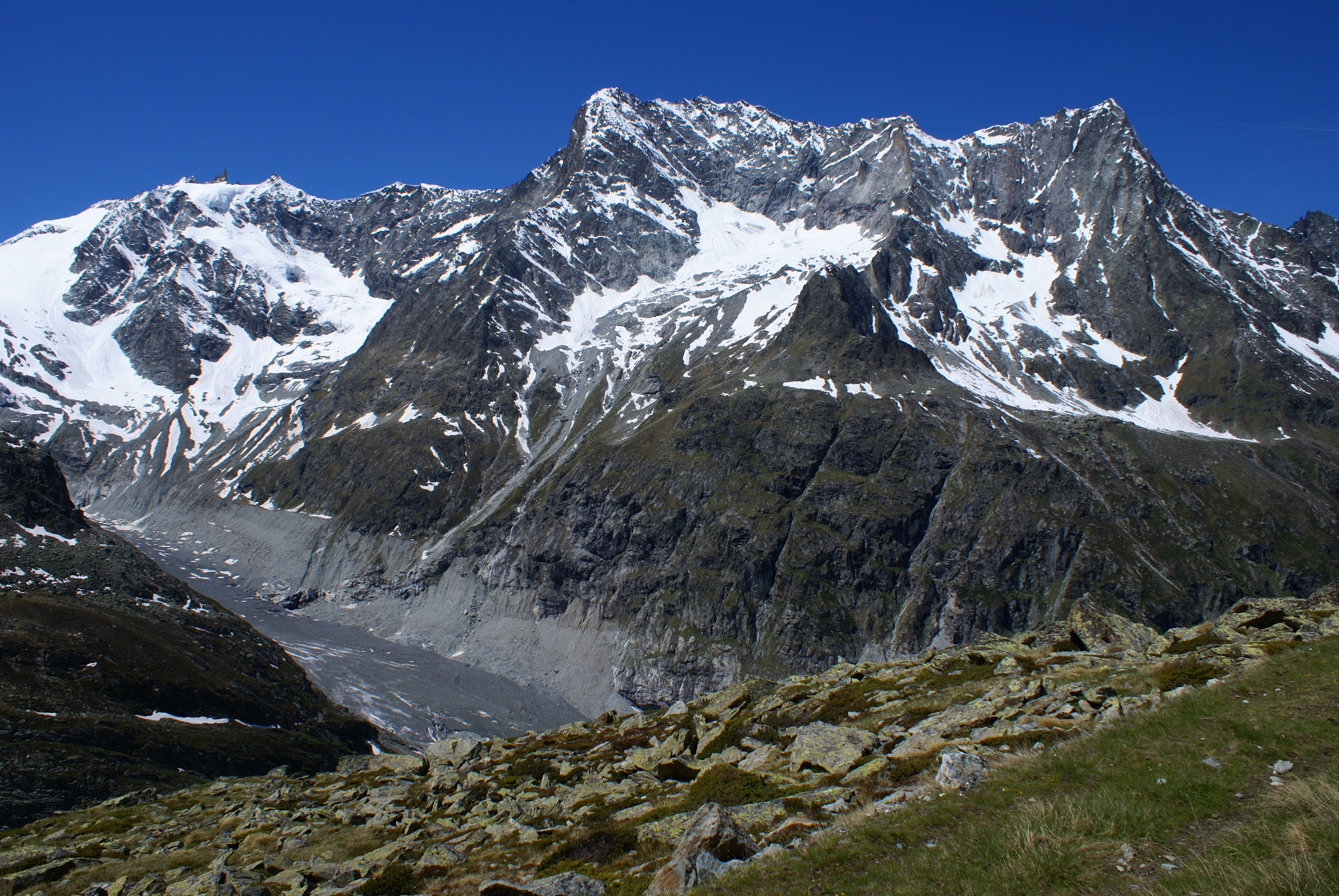 Dent de Veisivi (3.418 m), Perroc (3.676 m), Genevois (3.674 m), Glacier du Mont Miné